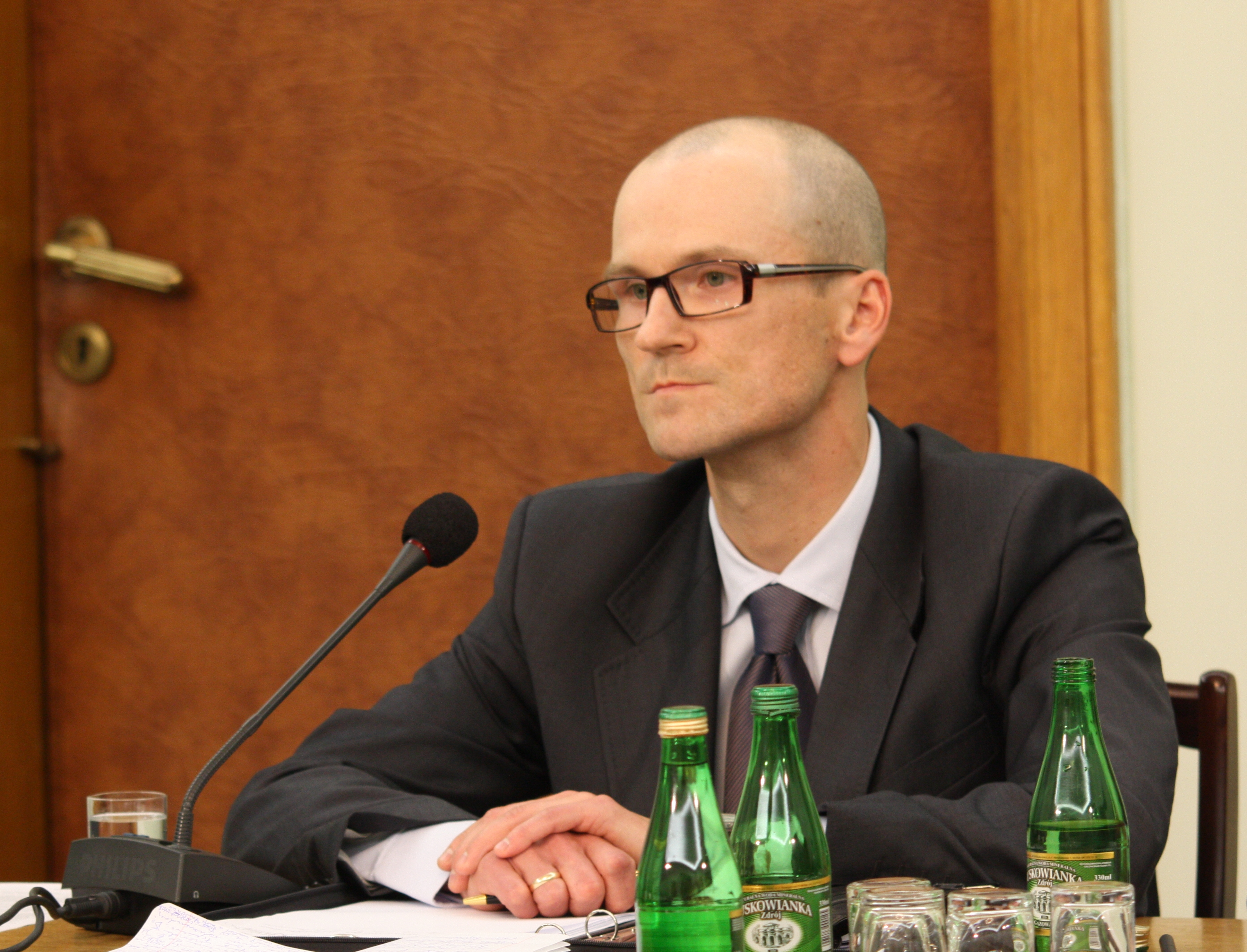 Tomasz Lipiec, polski polityk, działacz sportowy